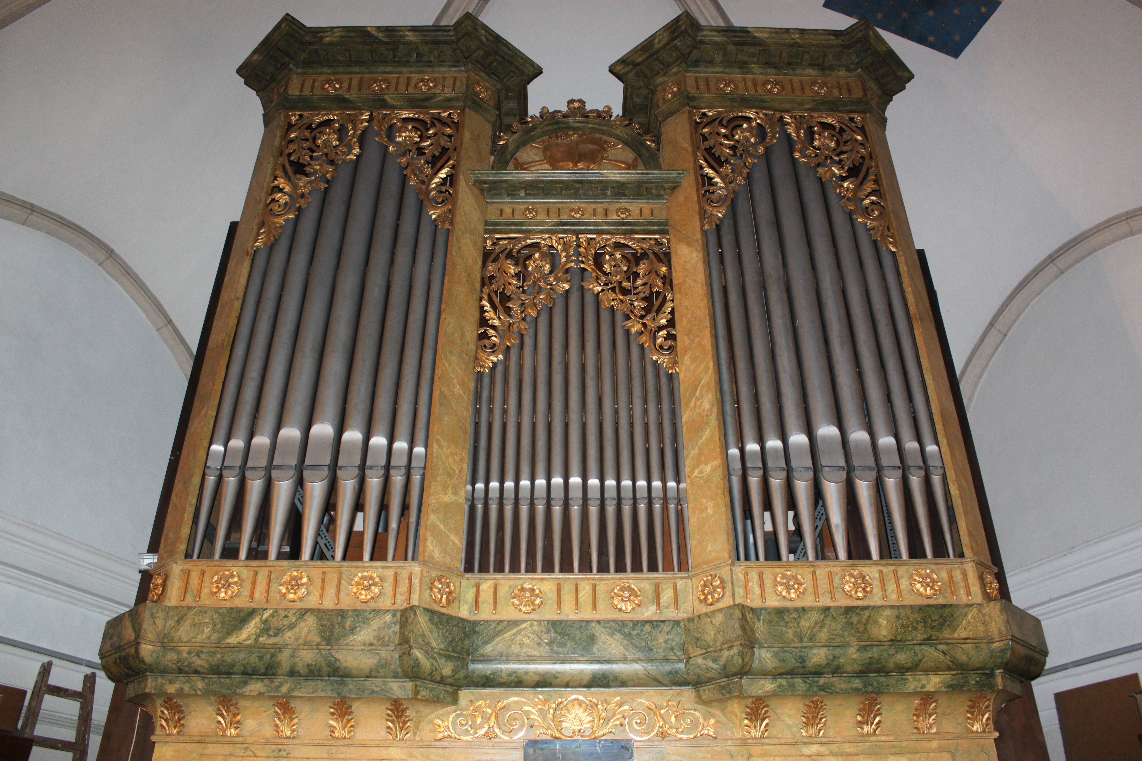 Orgel der Lutherischen Stadtkirche in Wien.